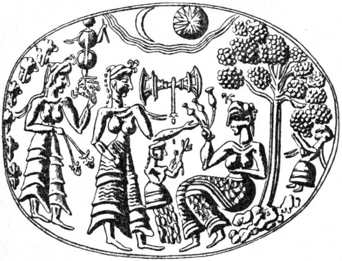 Abzeichnung des Motivs eines Goldrings aus Mykene mit der Darstellung einer Göttin mit drei Mohnkapseln, im Hintergrund eine Labrys (Doppelaxt), Griechenland